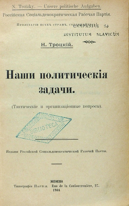 Троцкий, Н. [Троцкий, Л.Д.]. Наши политические задачи. (Тактические и организационные вопросы). Женева: Изд. Российской Социалдемократической Рабочей Партии, 1904. XII, 107 с. 17,7 х 12,2 см. На титуле печати на латыни. Первая теоретическая книга Льва Троцкого, представляющая манифест меньшевизма и содержащая нелицеприятную полемику с Лениным («Эта злостная и нравственно-отвратительная подозрительность Ленина, плоская карикатура трагической нетерпимости якобинизма...»).